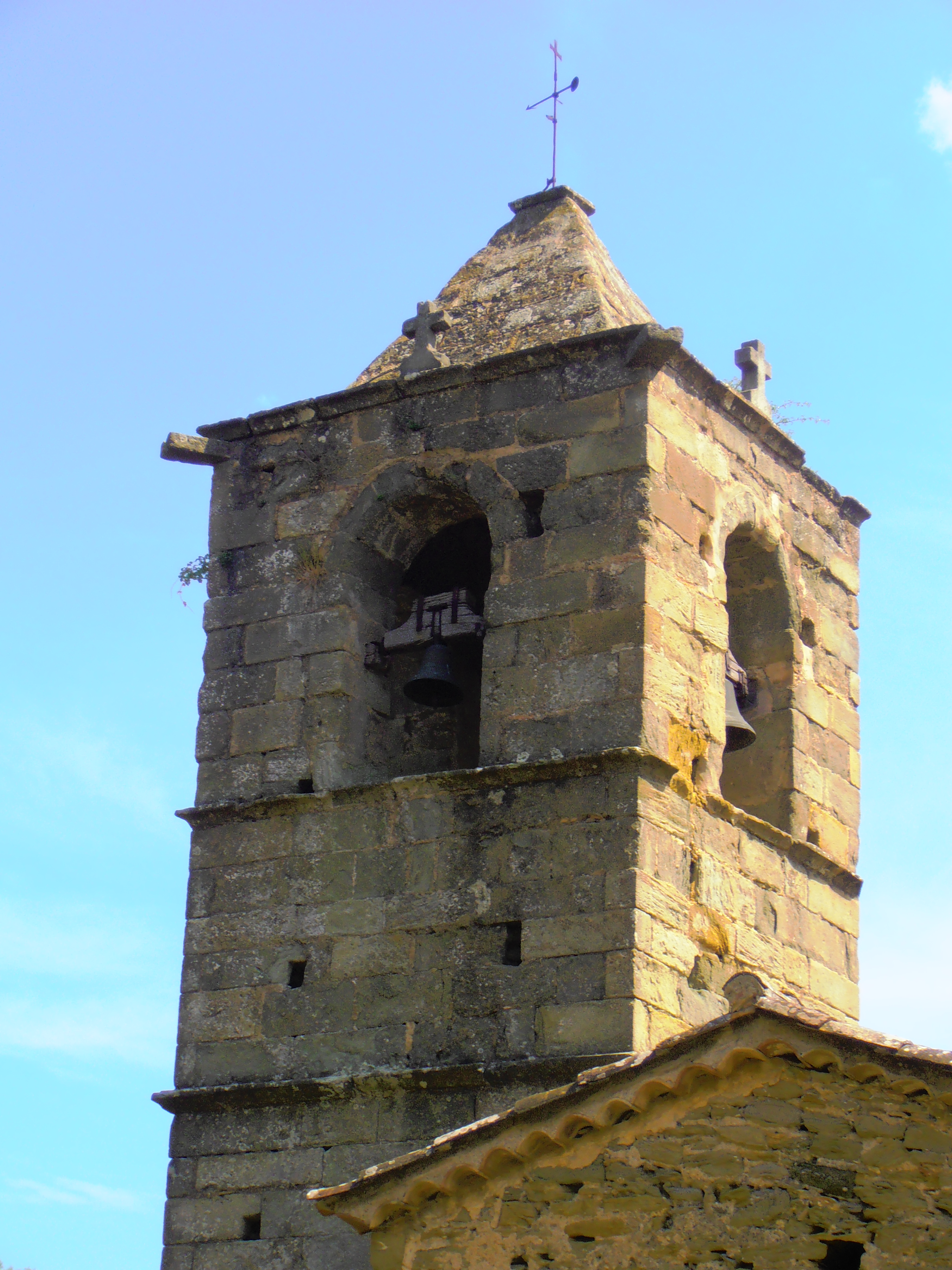 El Vell campanar